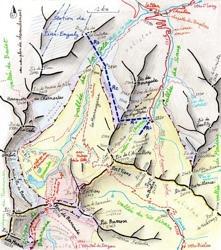 Carte des vallées de La Gela et de Saux, schématisant leur topographie et leut géologie, et indiquant, sous la forme d'un tireté bleu le projet d'installation de remontées mécaniques entre l'entrée nord du tunnel d'Aragnouet-Bielsa et la station de ski de Piau-Engaly.